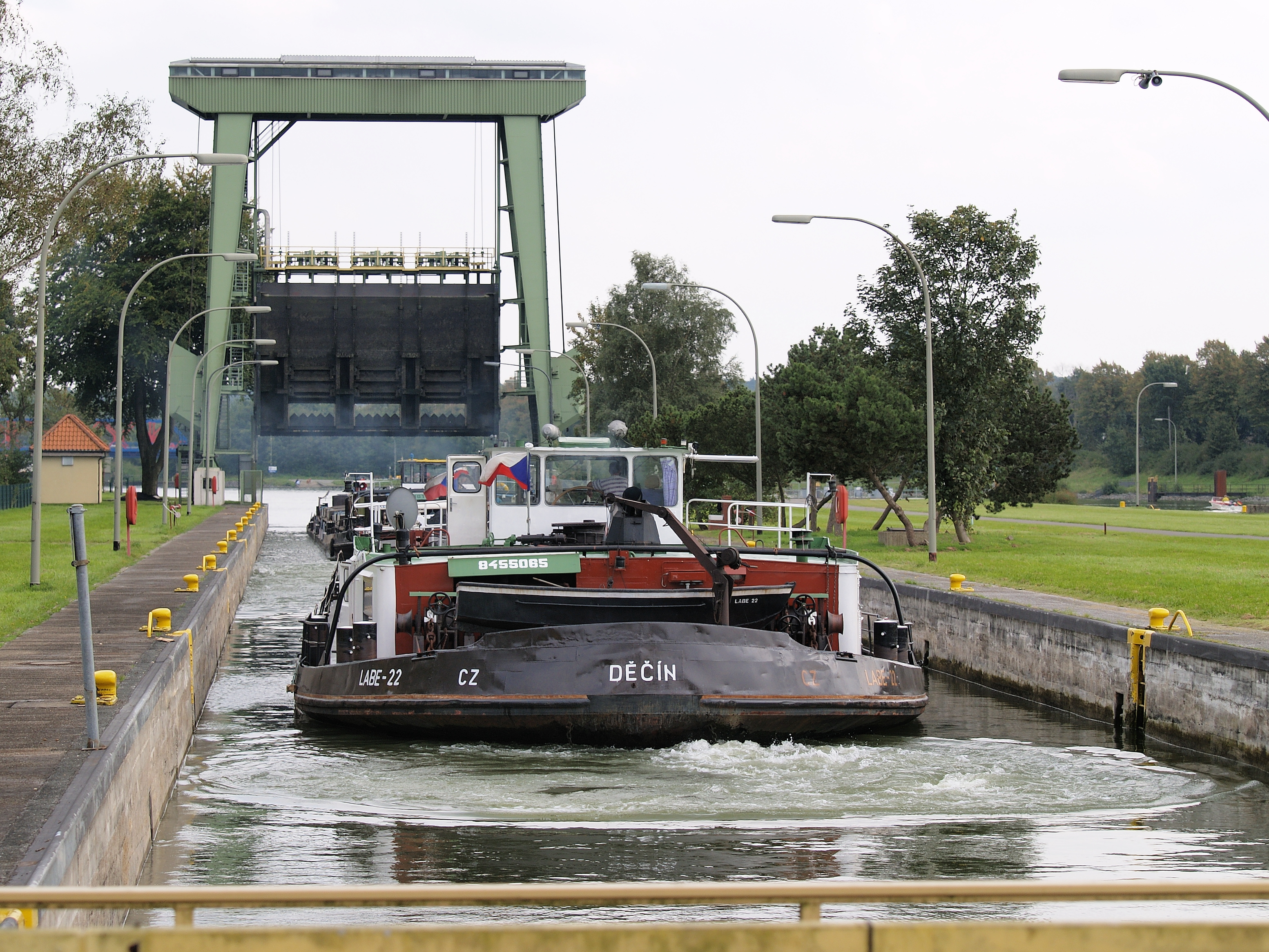 Schleuse Datteln am Wesel-Datteln-Kanal (WDK), Schleusenkammer, oberes Hubtor geöffnet